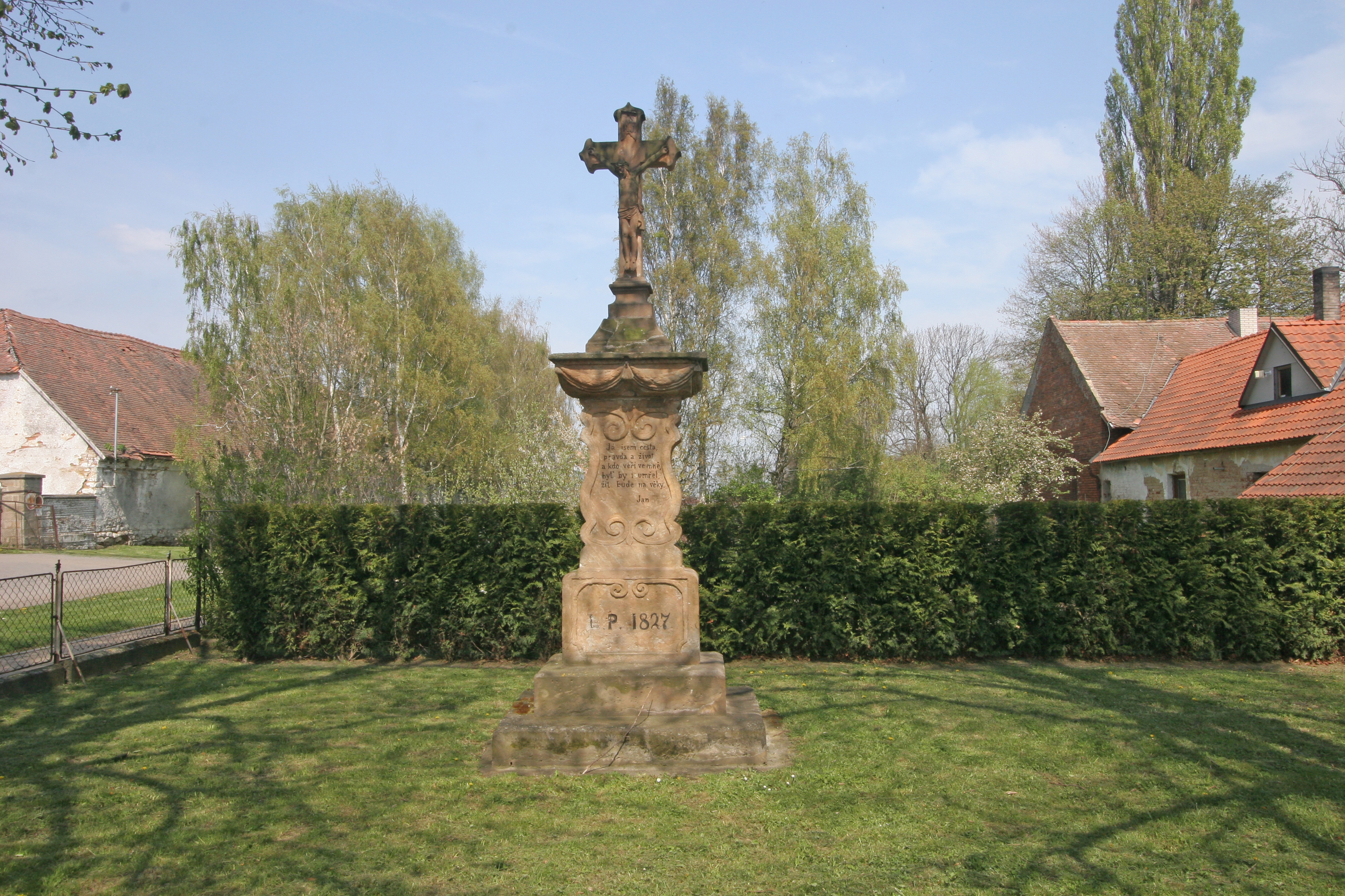 Třibřichy křížek